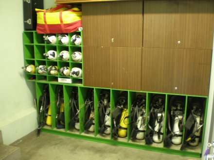 Hingamisaparaatide laoruum päästekomandos. Alumisel riiulil on näha komplekteeritud hingamisaparaadid, üleval suruõhuga täidetud varuballoonid.